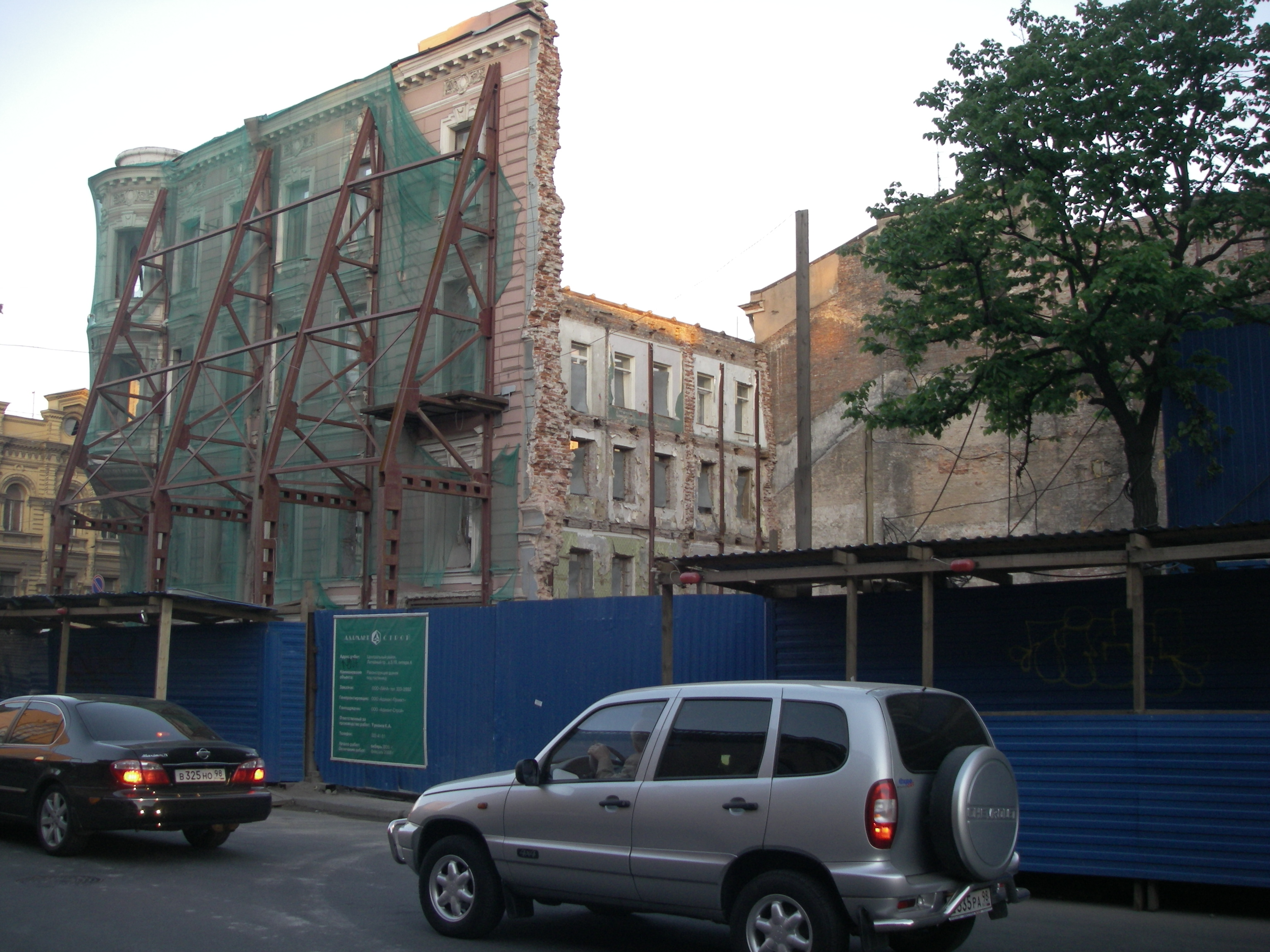 Перестройка здания с сохранением оригинального фасада (охраняемого как культурный памятник). На время построения здания передняя стена удерживается на специальных кронштейнах. Россия, Санкт-Петербург, Литейный проспект, дом 5 (дом 19 по улице Чайковского). Дом на : [1]